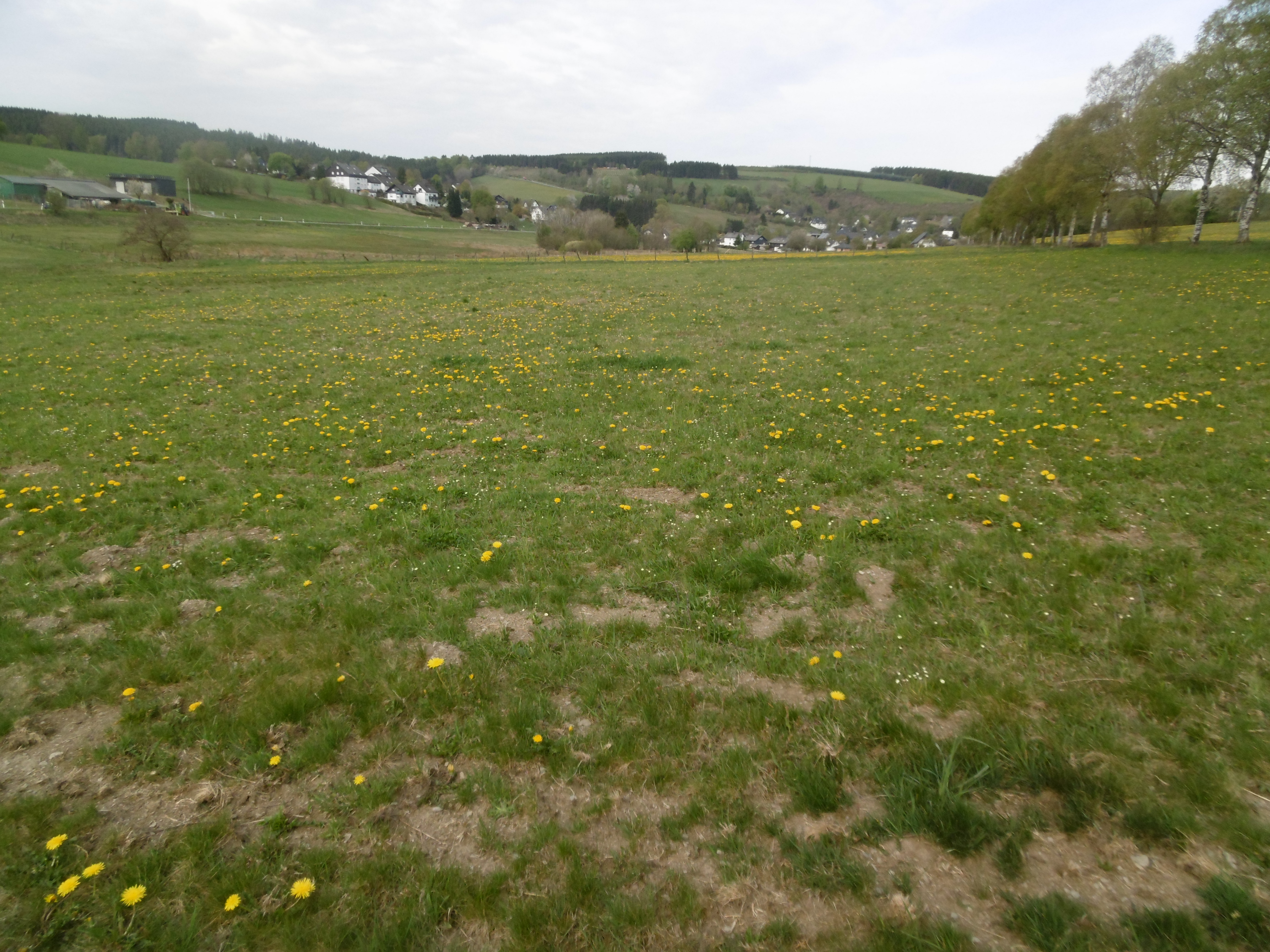 Naturschutzgebiet Springebachtal (Medebach) von Nordost; Im Hintergrund Grönebach und LSG-Flächen.